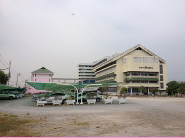 ลานจอดรถครูและบุคลากร โรงเรียนสวนกุหลาบวิทยาลัย รังสิต